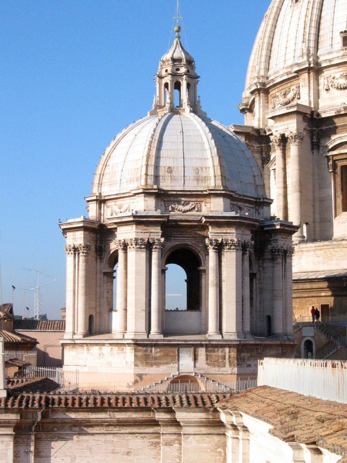 Roma San Pietro, cupola minore